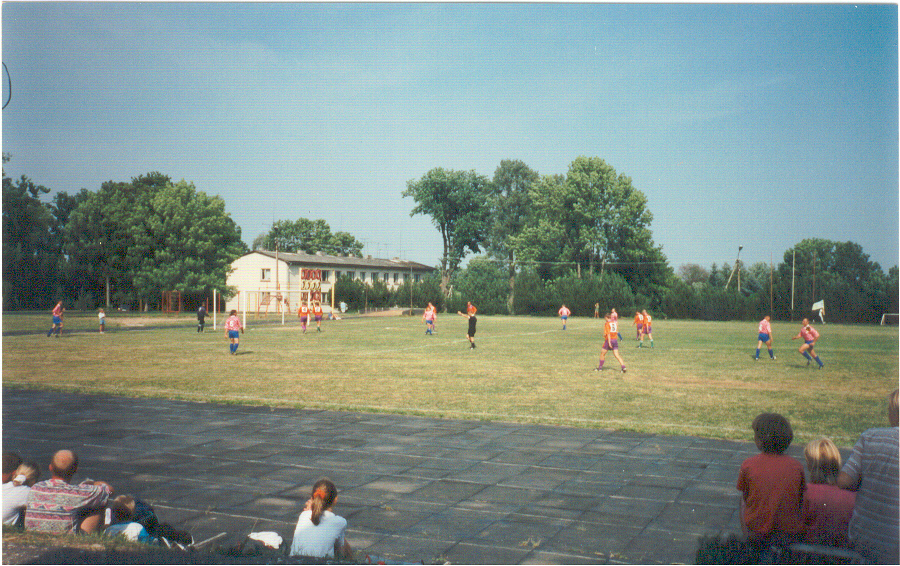 Fra fotballbanen i Karksi-Nuia i 1997. Foto: Jan-Erik Løken